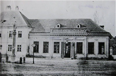 2. Kaffeehaus in Wien Ottakring, des Gansterer Mathias, Namensgeber der Gansterergasse